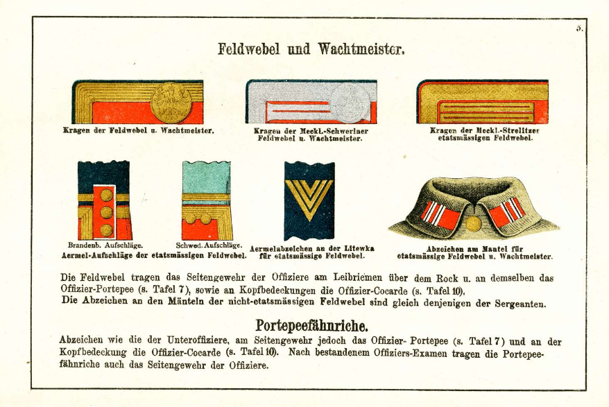 Gradabzeichen der Portepee Unteroffiziere